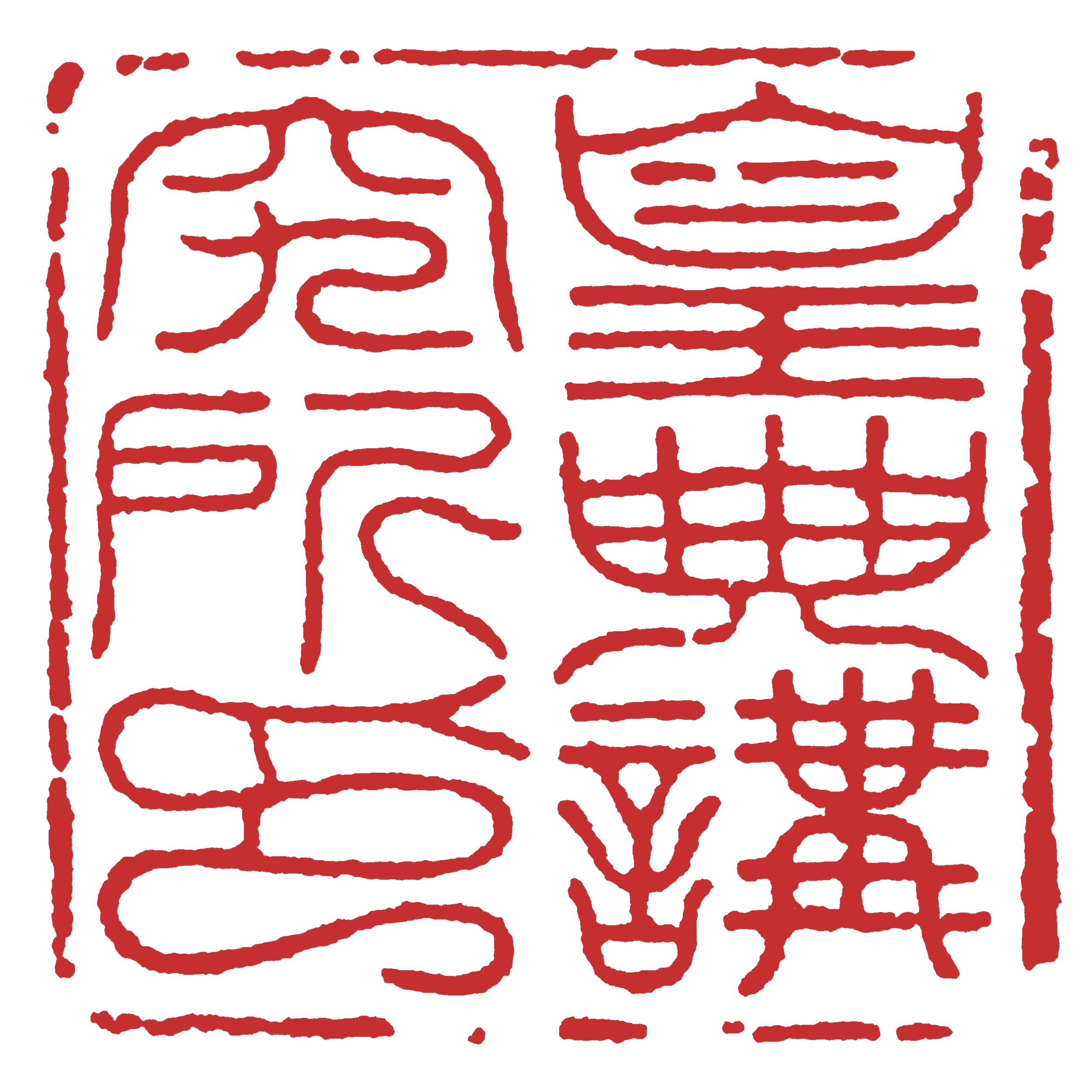 皇典講究所印の印影。5.2cm×5.2cm。國學院大學博物館の展示（撮影可）を元に、投稿者が制作。